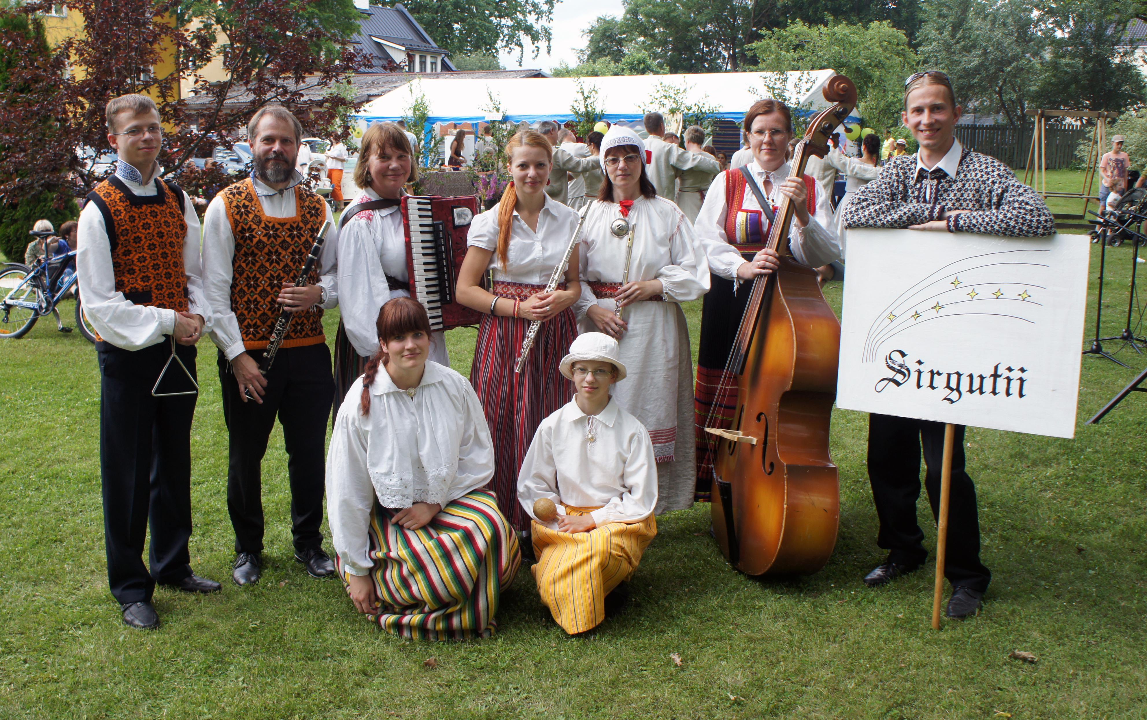 Ansambel Sirgutii 2016. aastal Türi aedlinnakohvikute päeval